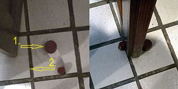 Kombination aus Türstopper und -feststeller